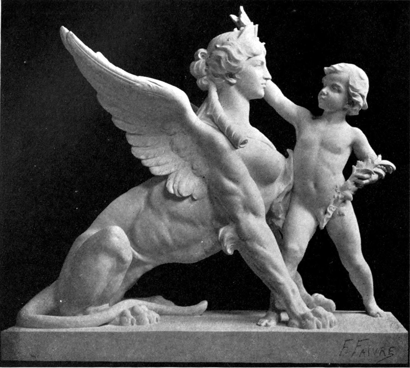 L'enigme